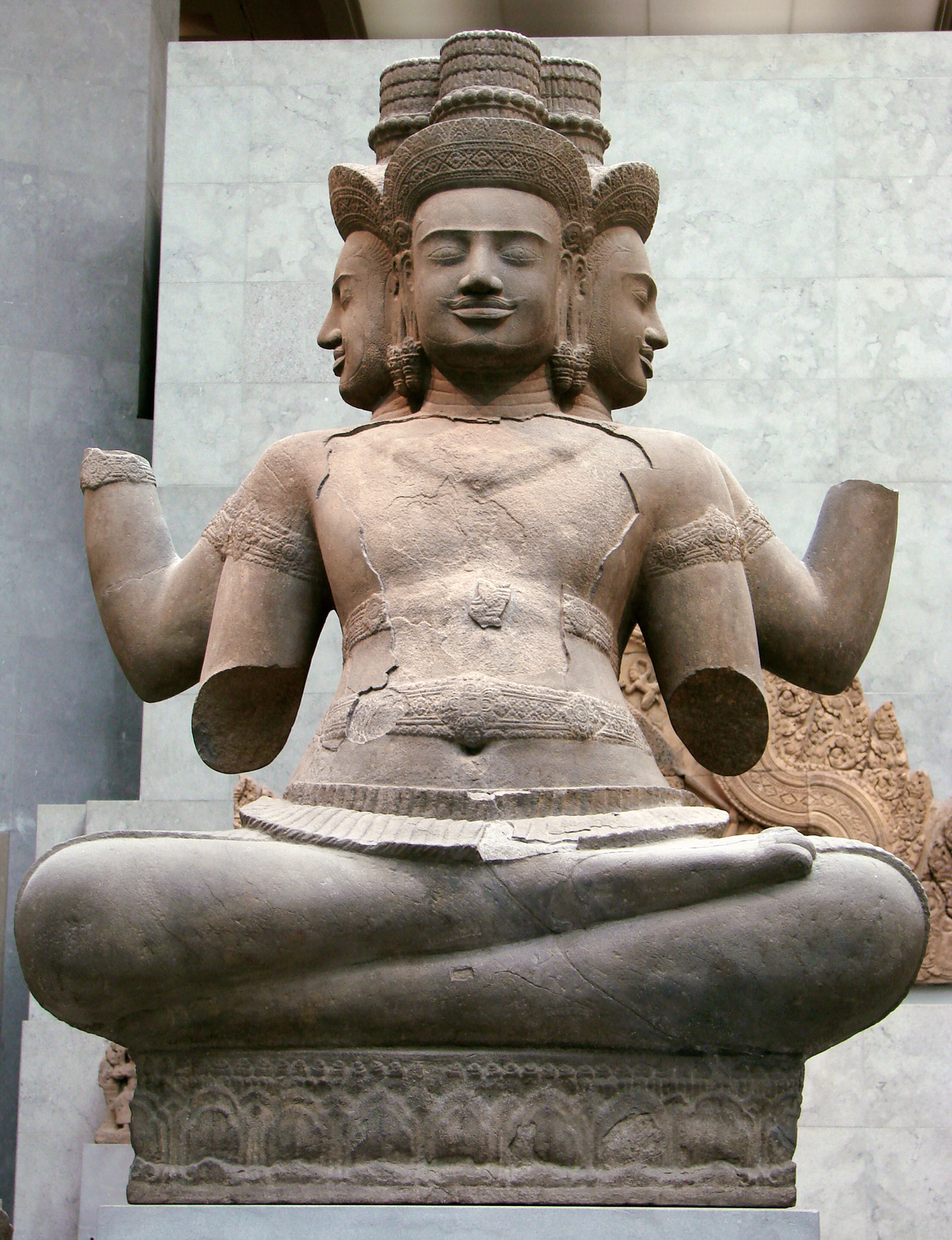 Brahma. Cambodge, province de Battambang, Vat Baset, style de Koh Ker, milieu du 10ème siècle, grès.